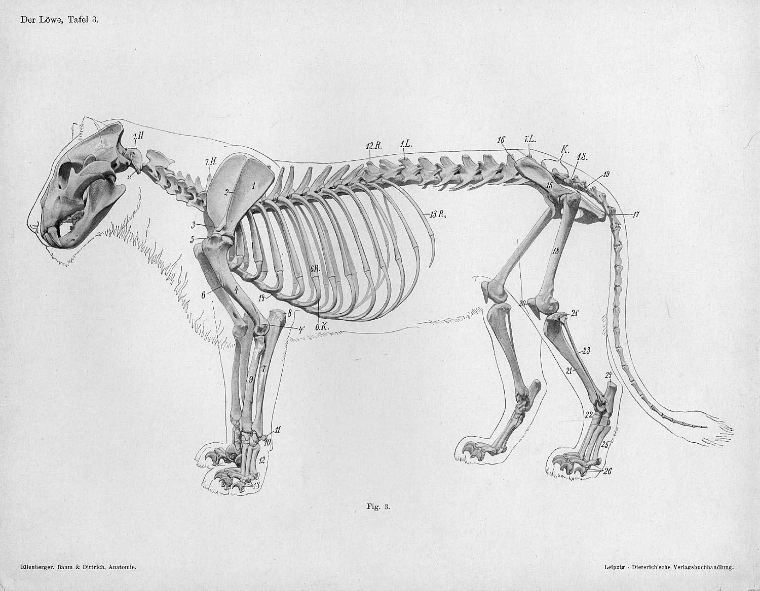 Animal anatomical engraving from Handbuch der Anatomie der Tiere für Künstler' - Hermann Dittrich, illustrator.